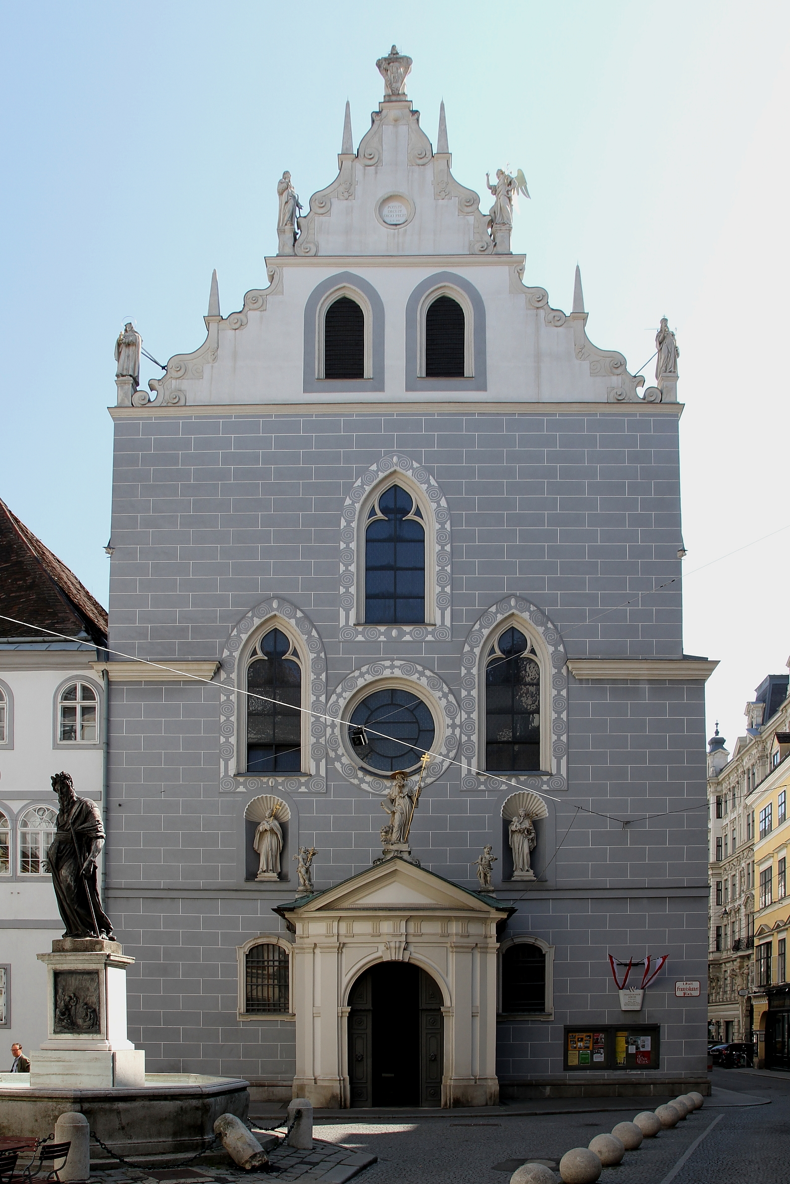 Die Wiener Franziskanerkirche.